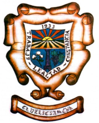 Escudo de la Ciudad de Delicias, Chihuahua